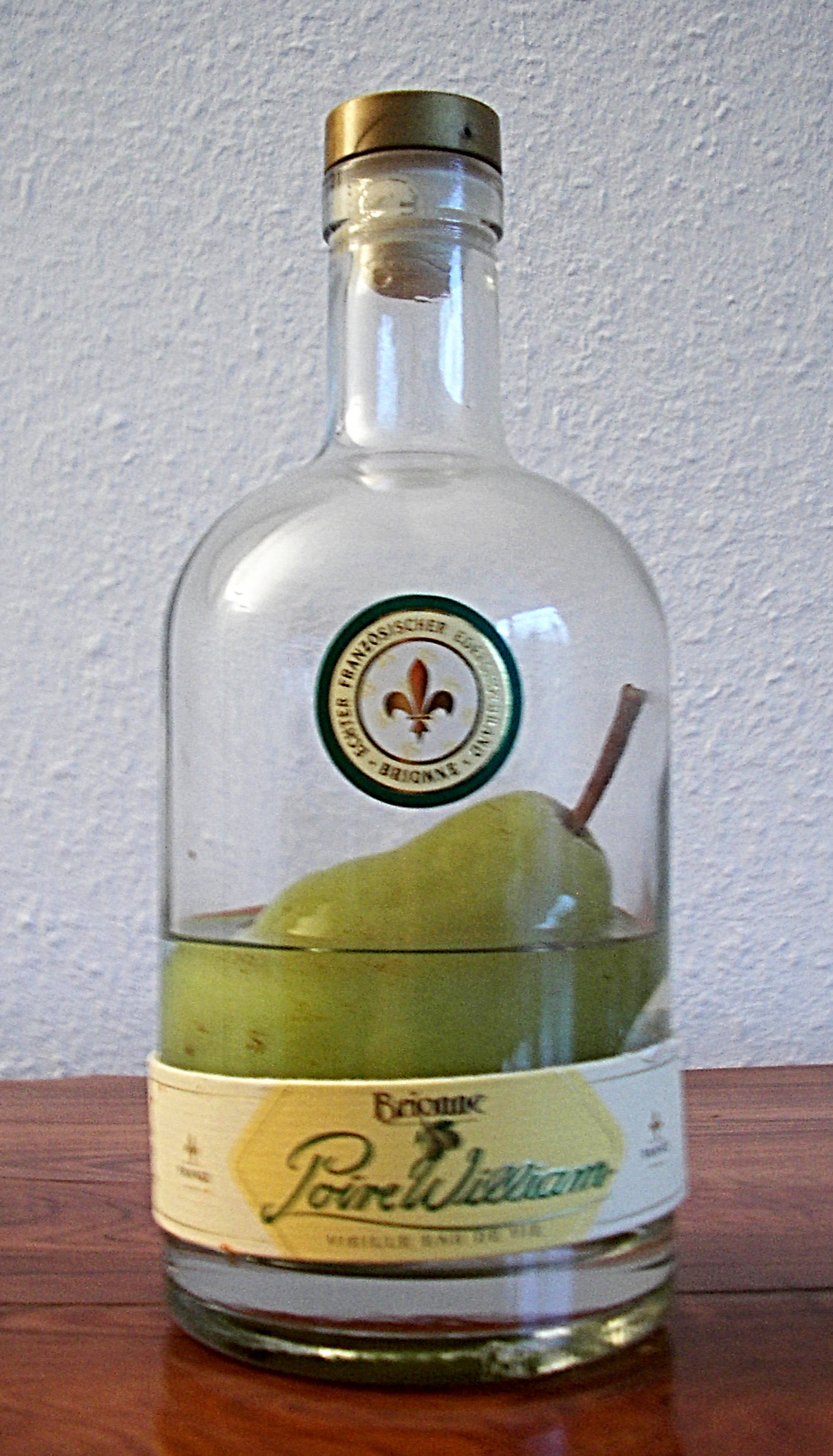 Flasche Williams Christ Obstbrand von Aldi. Import aus Frankreich 4.0M DigitalCAM